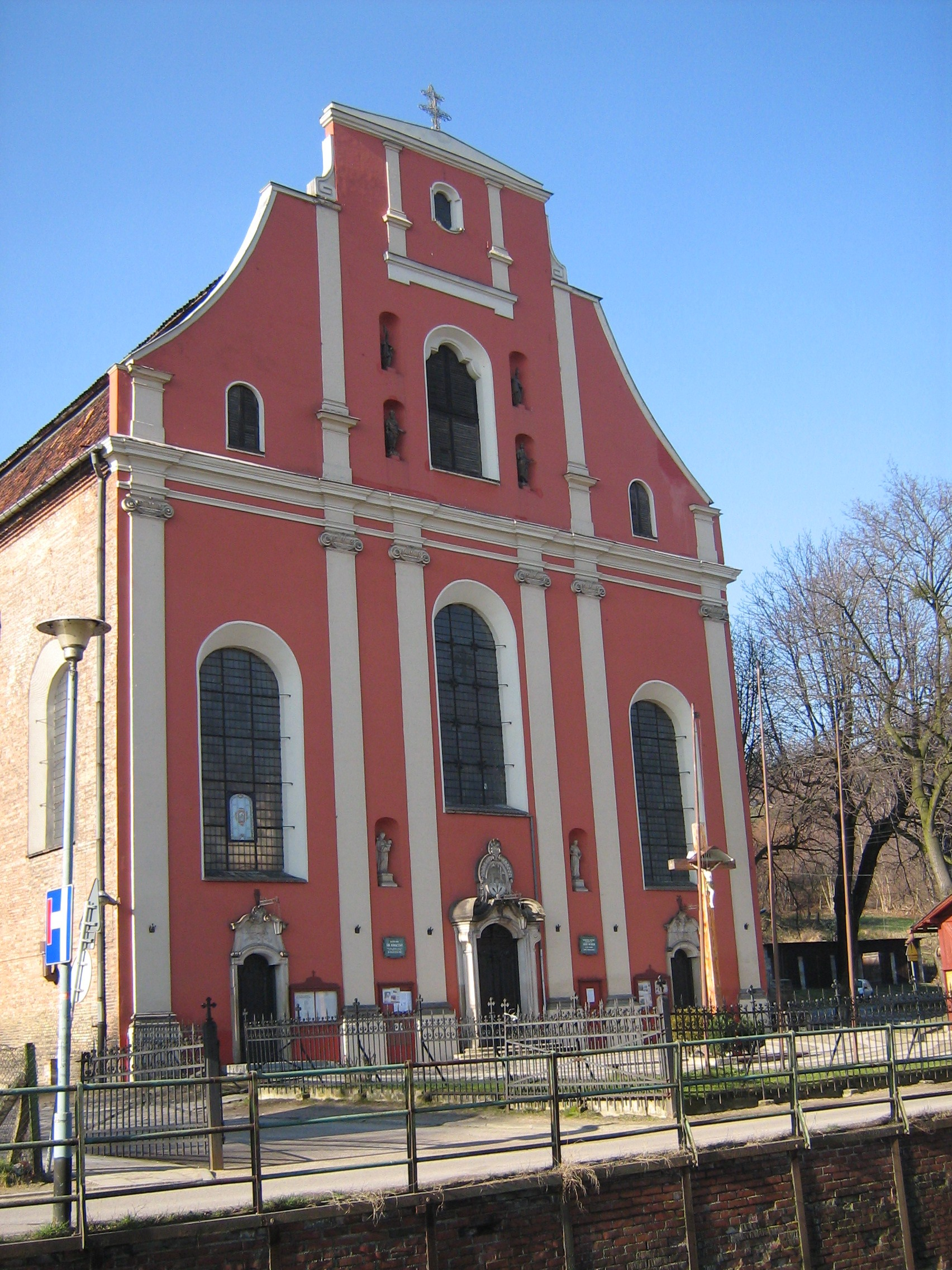 Kościół Św. Ignacego w Gdańsku.